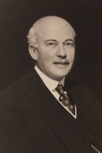 David Dunlap (1863-1924)